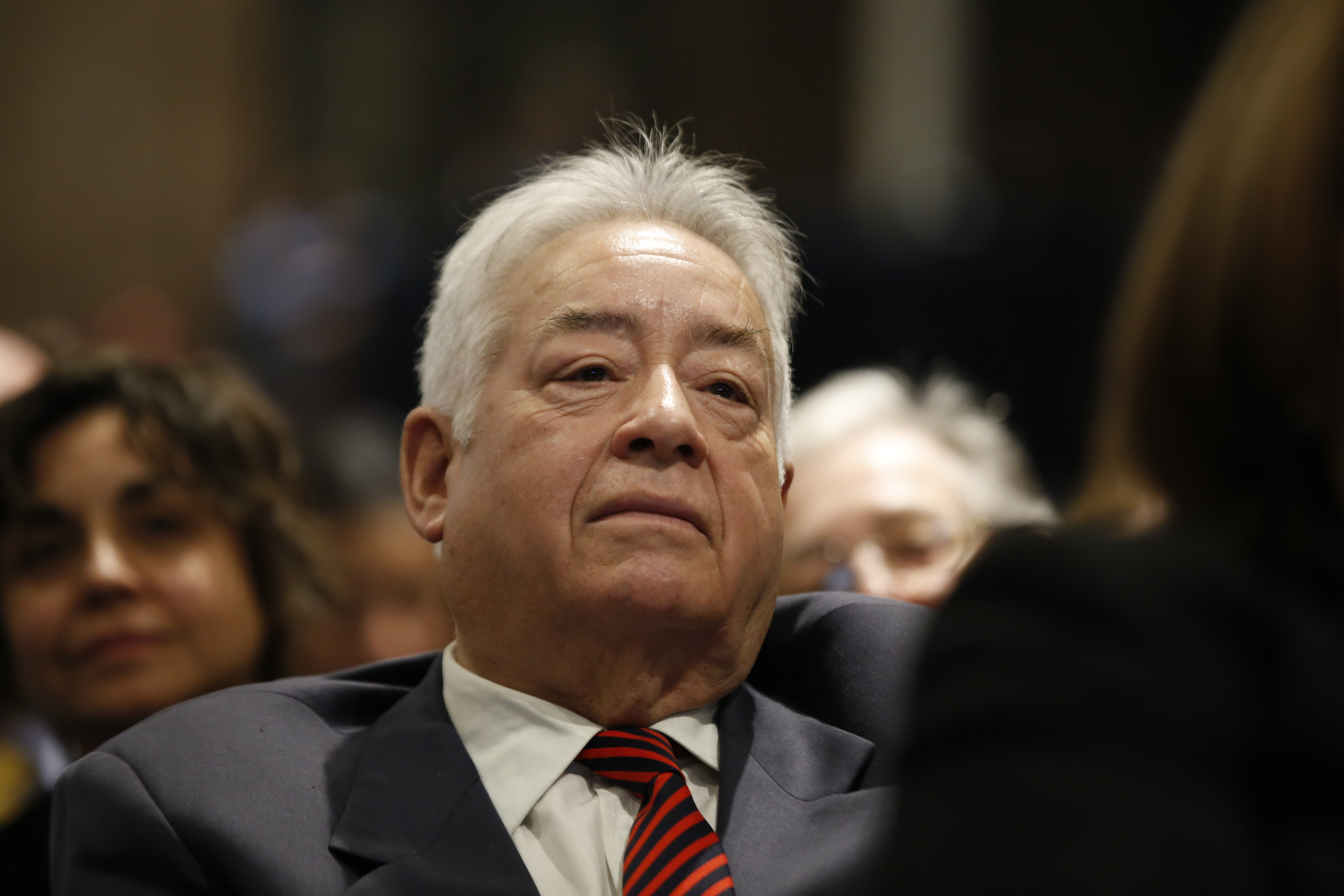 Ramón Núñez Villarroel en la ceremonia "Celebración Día del Sagrado Corazón"